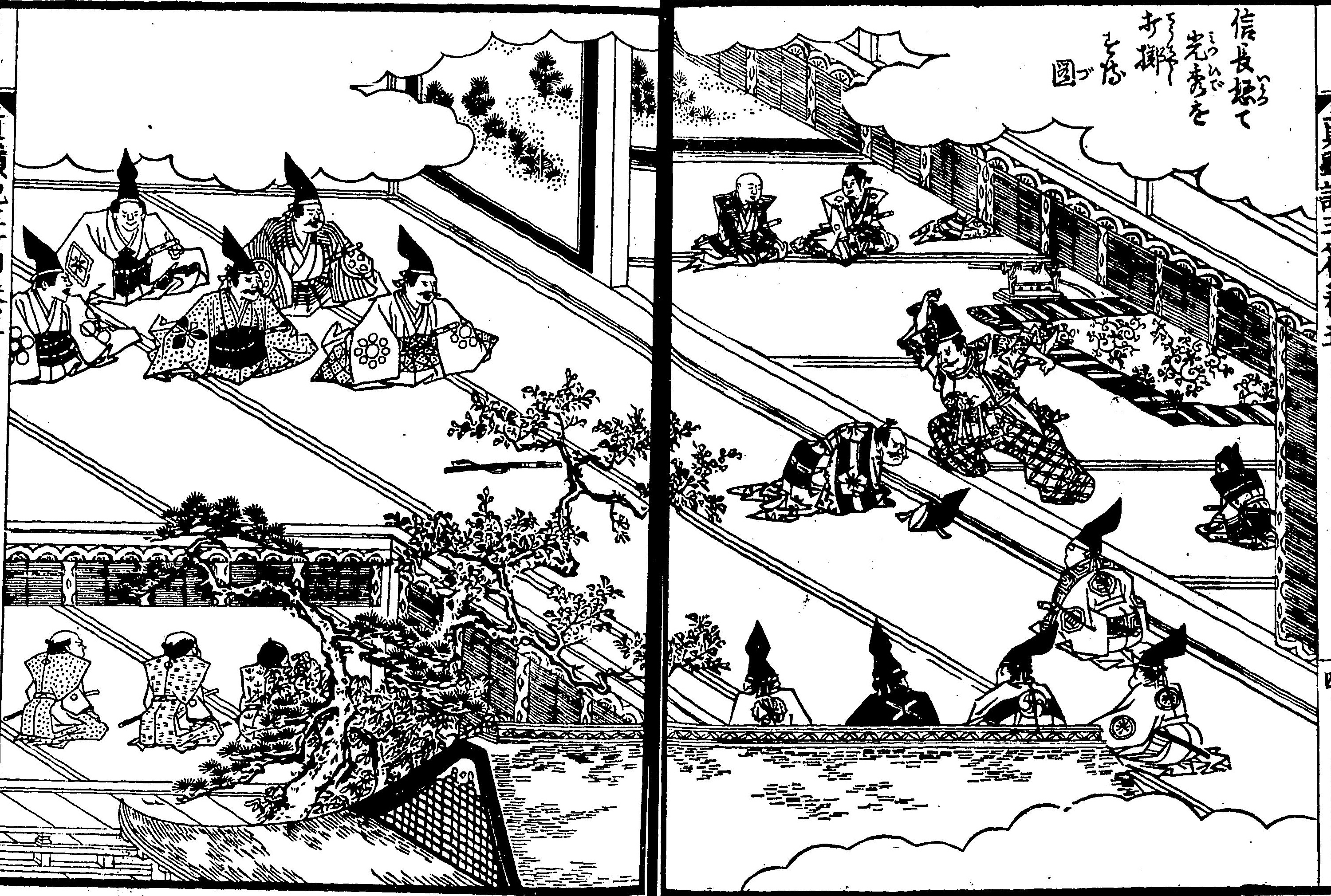 『絵本太閤記』の一場面。（絵：岡田玉山） 「信長怒りて光秀を打擲し給う図」